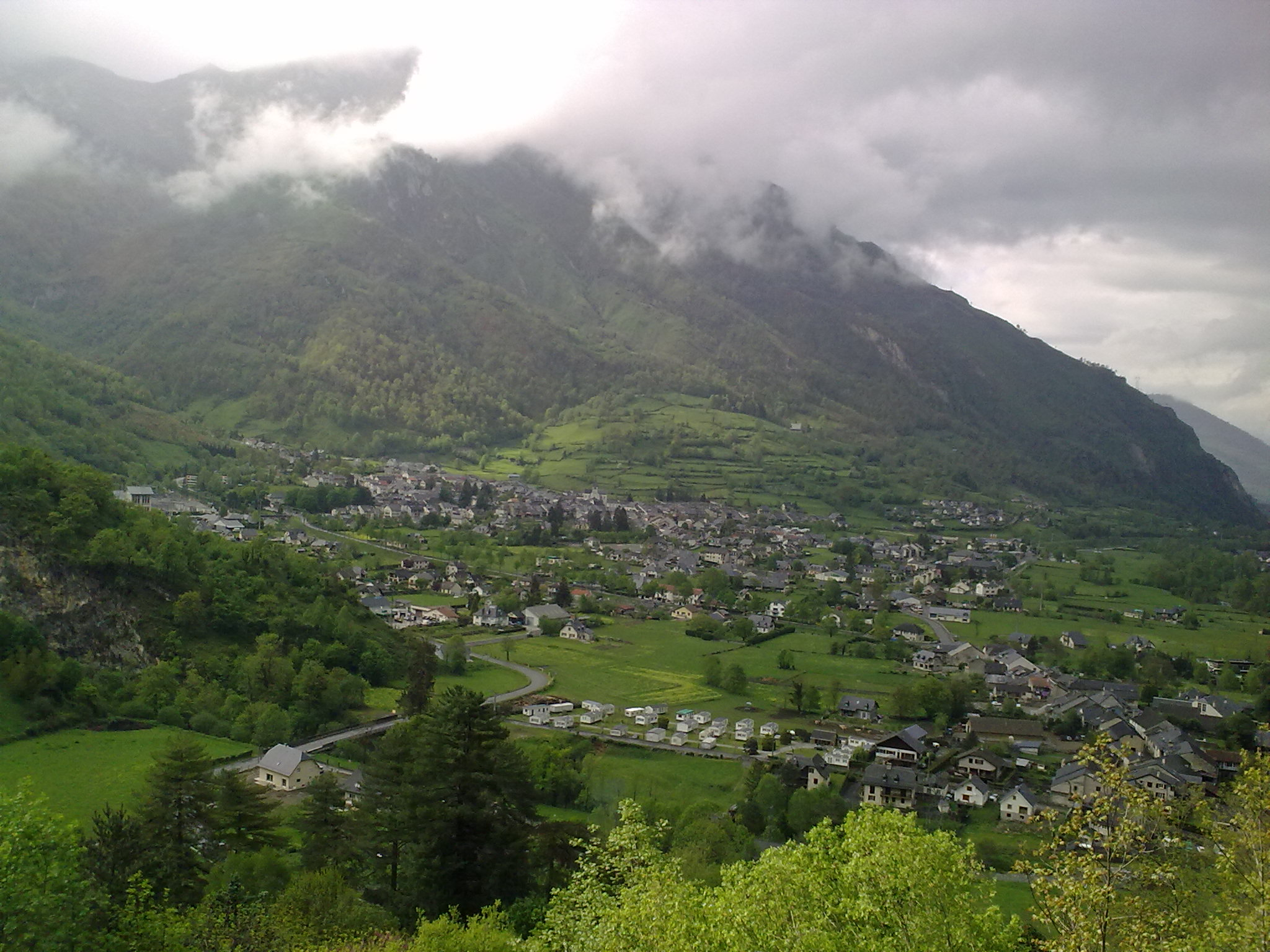 Laruns, France